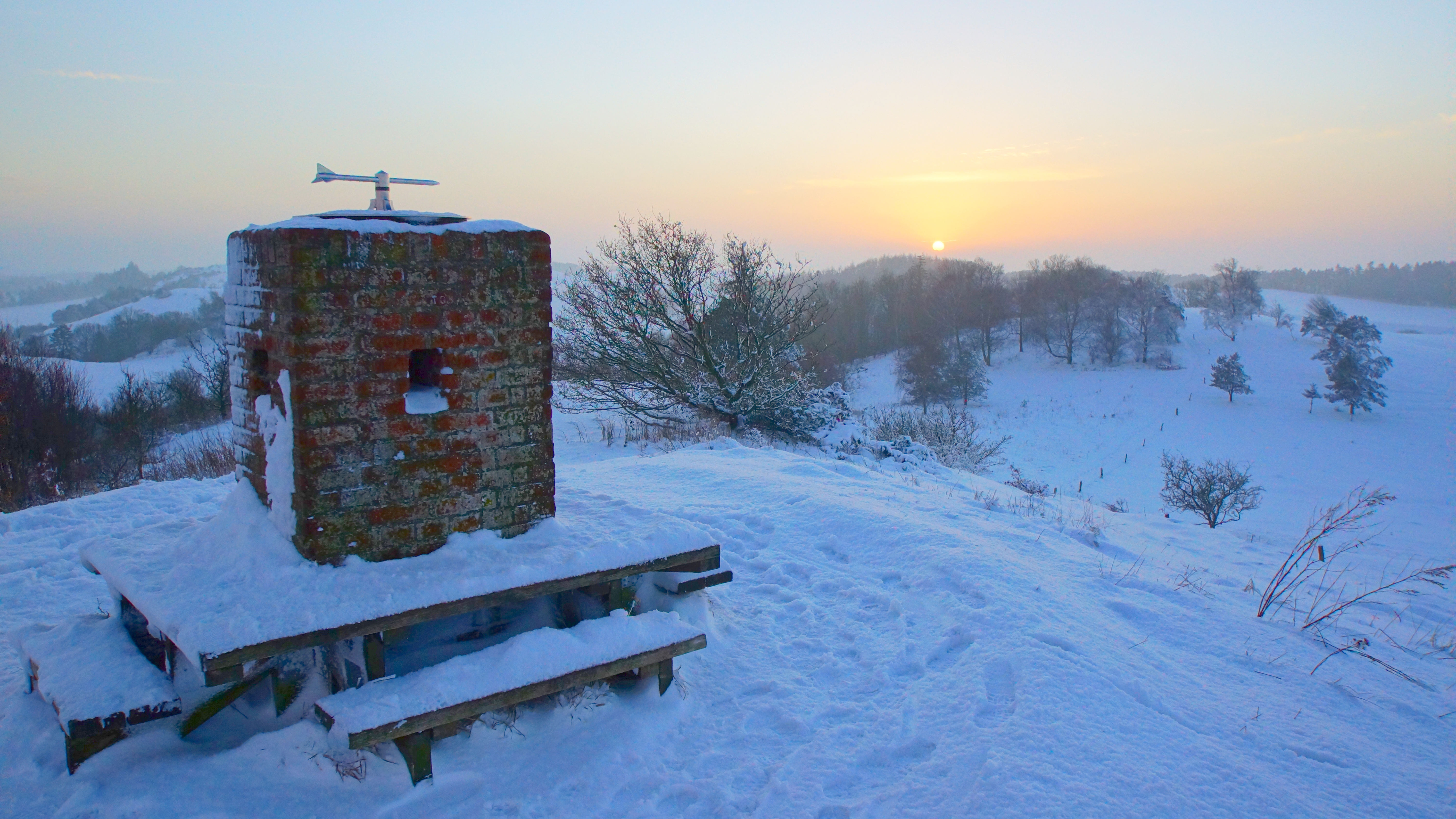 Agri Bavnehøj, vinter